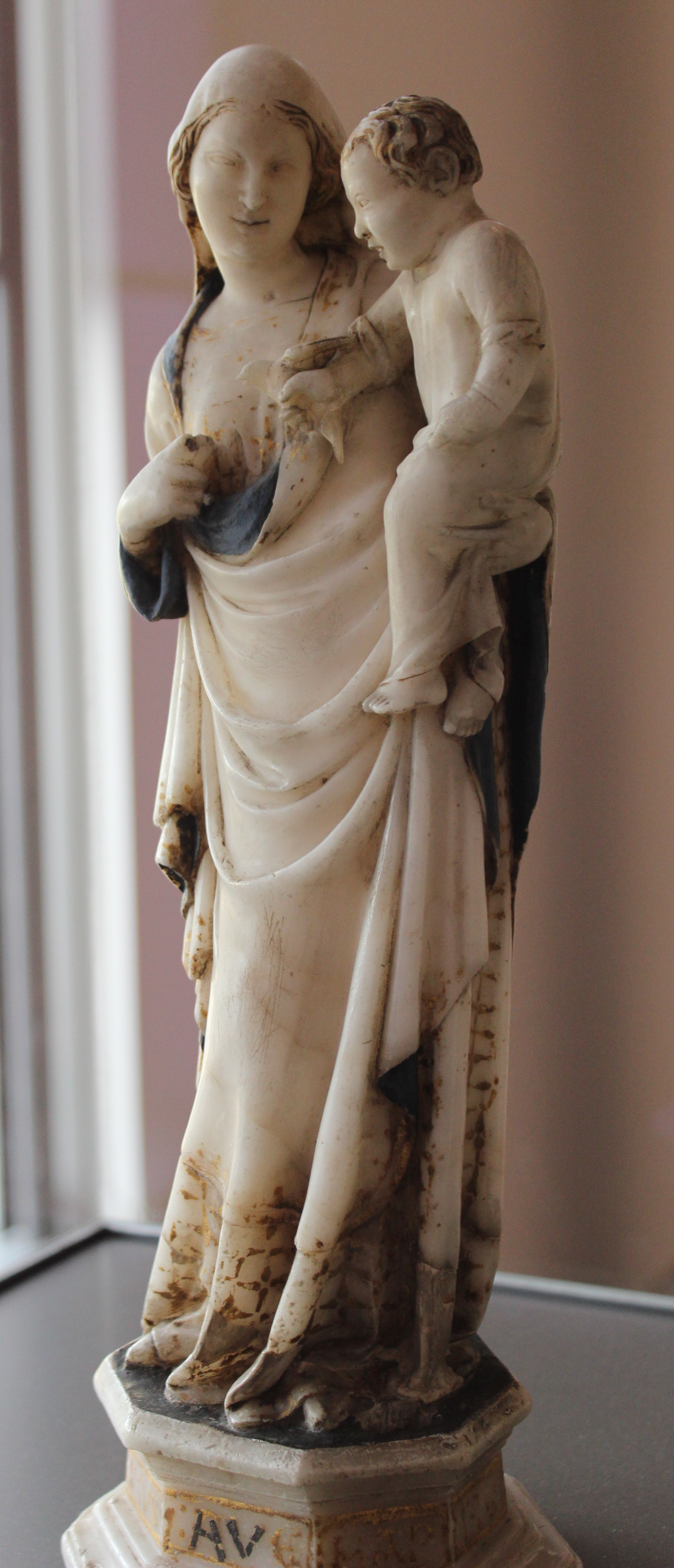 Berlín. Bode Museum. Virgen con el Niño de Nino Pisano.